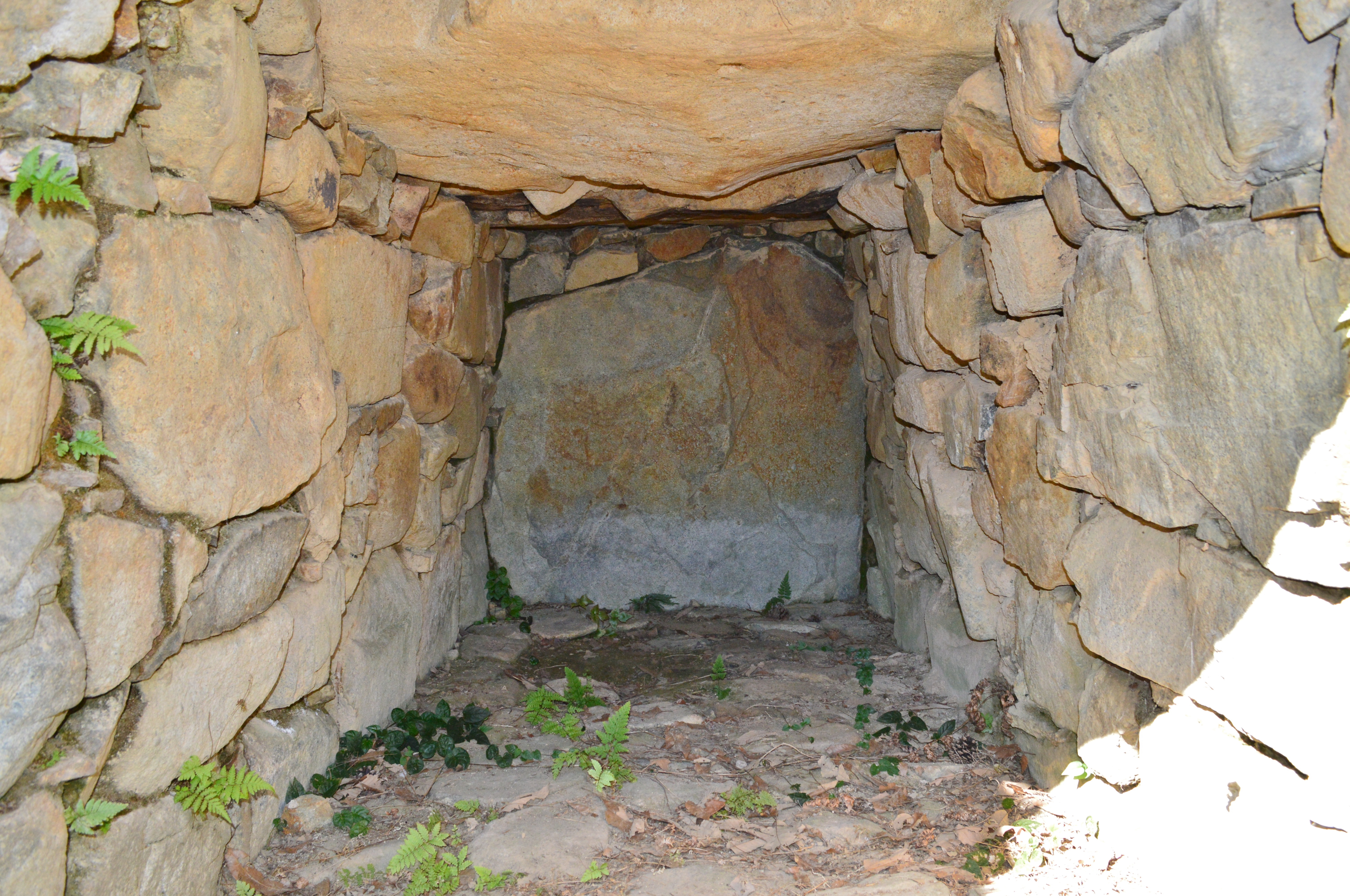 中山荘園古墳 石室